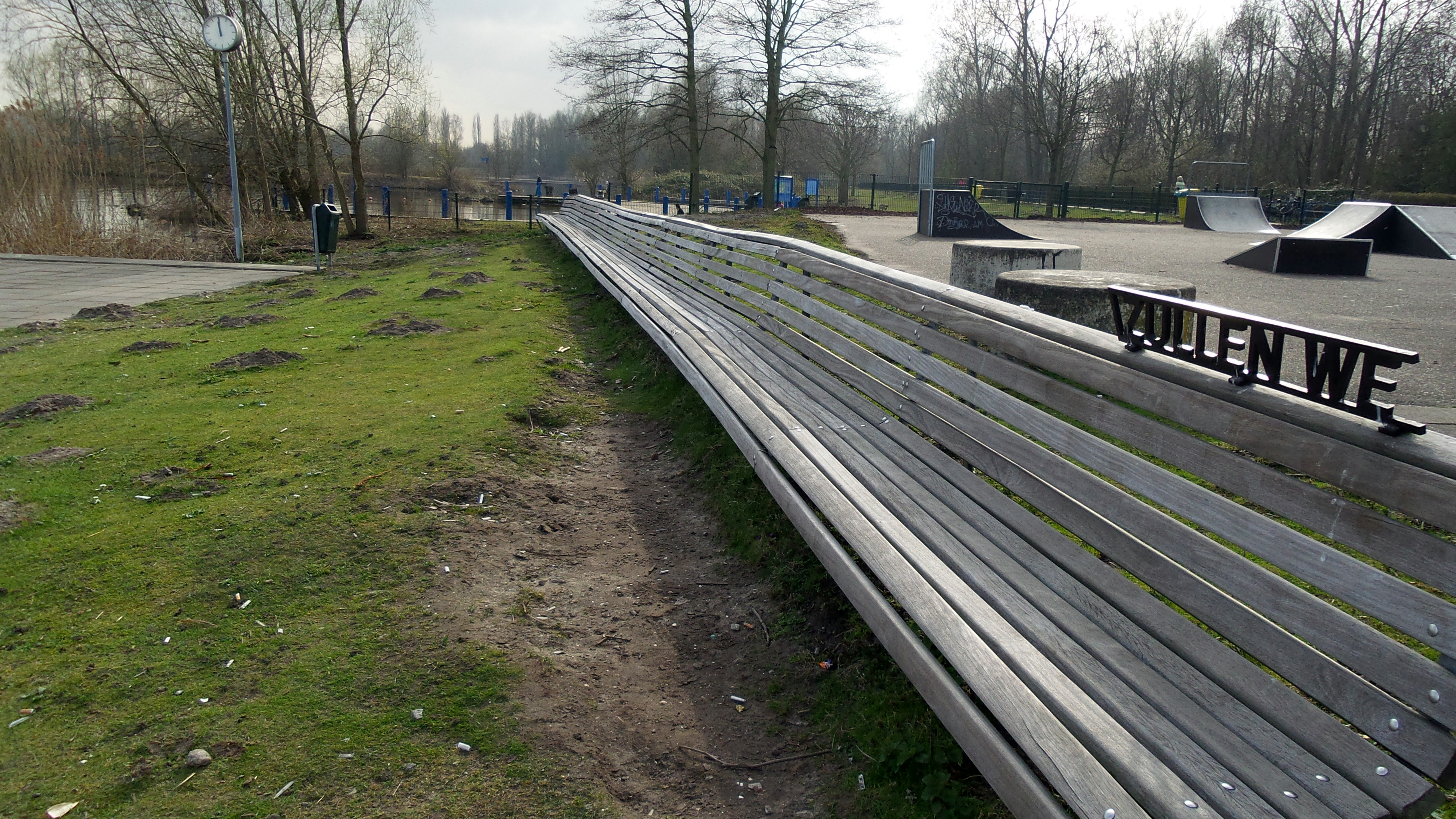 Kunstwerk van Semna van Ooy in 2004 geplaatst aan de over van de Nieuwe Meer, aanlegplaats van het pontje naar het Amsterdamse bos. Het is een verlengde stadsbank model 'Canape' met een klok op ov-mast.